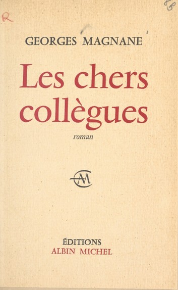 Georges Magnane Les chers collègues 1963 couverture